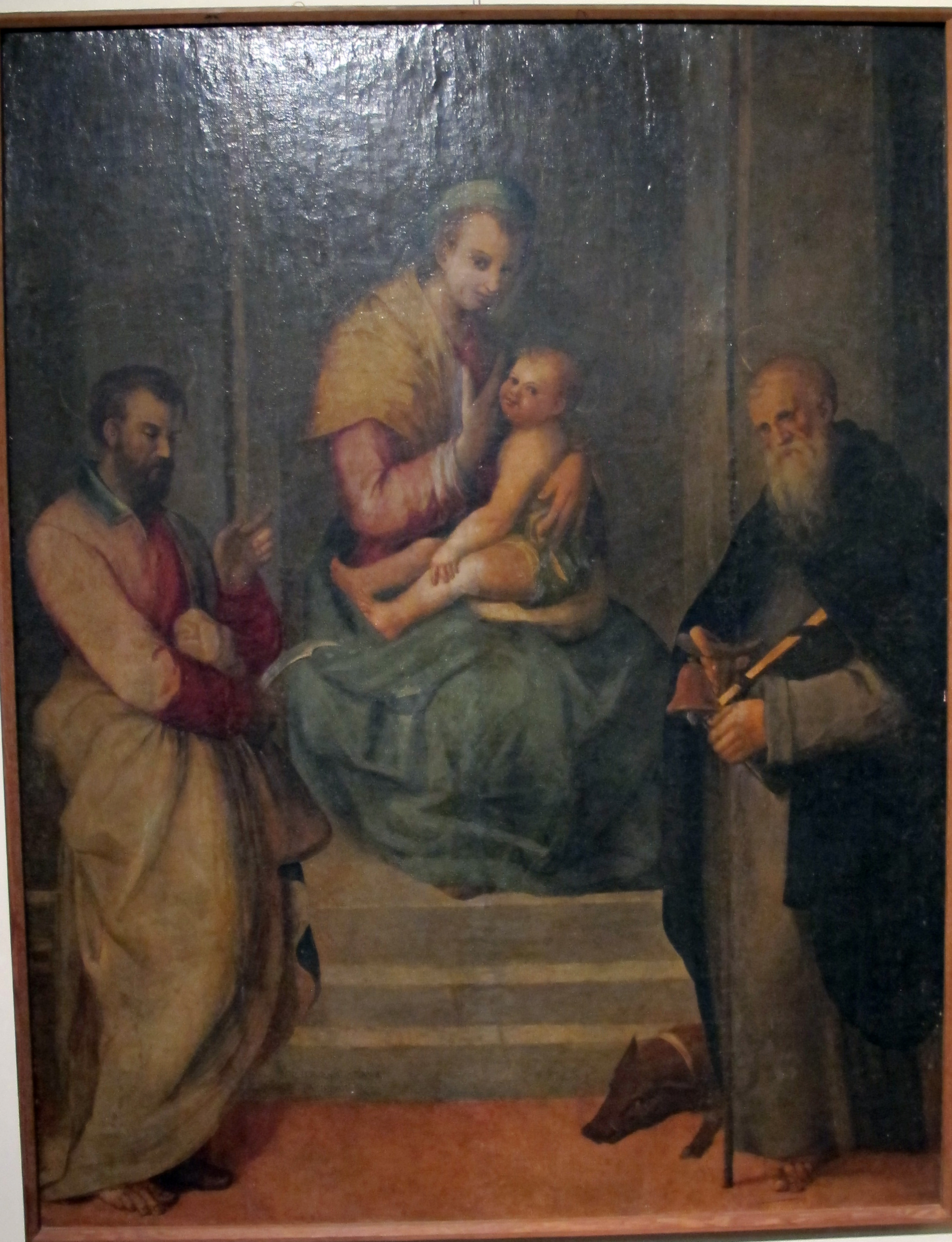 Museo diocesano (San Miniato)